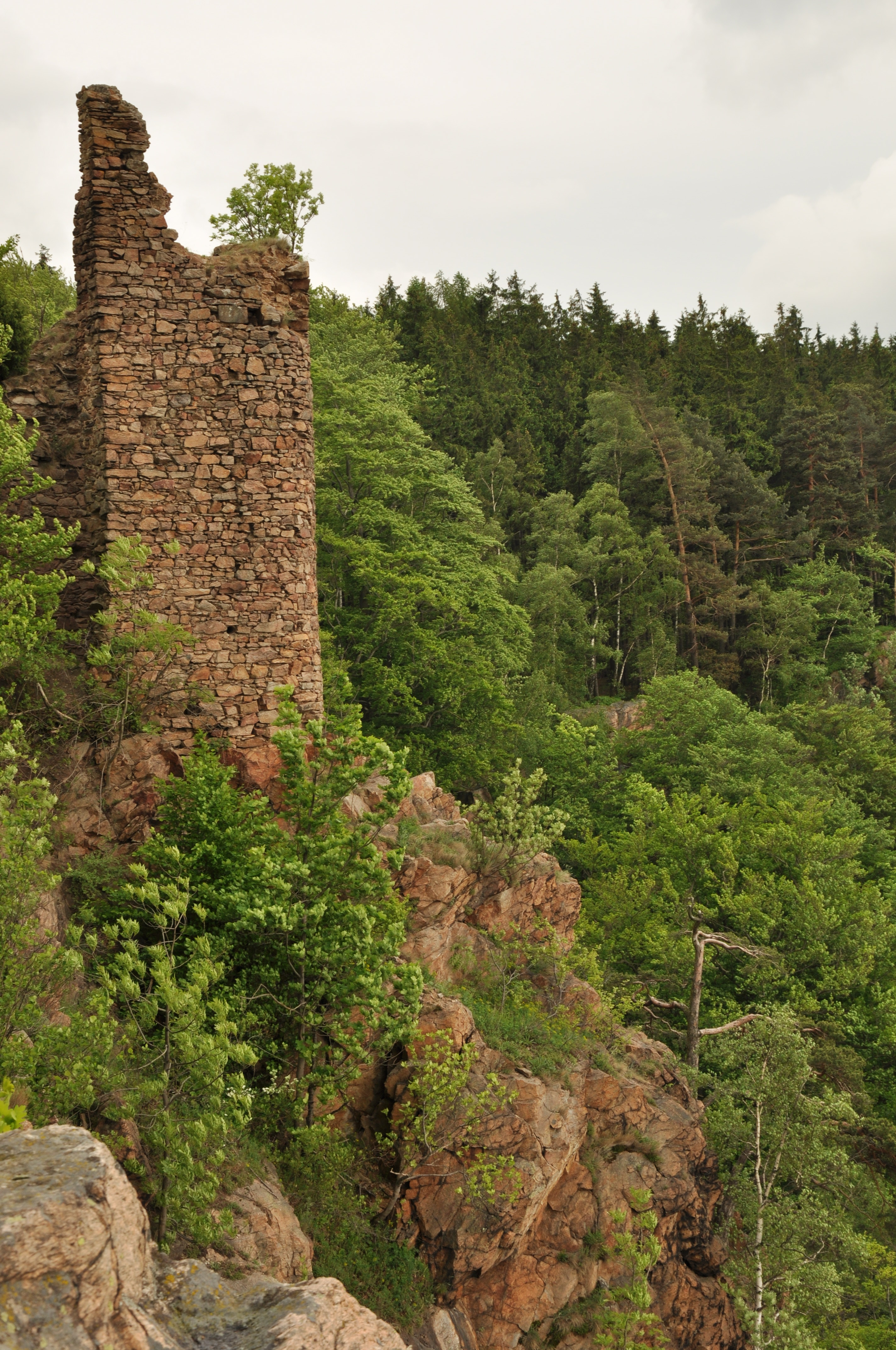 Hrad, zřícenina (Seč), Seč